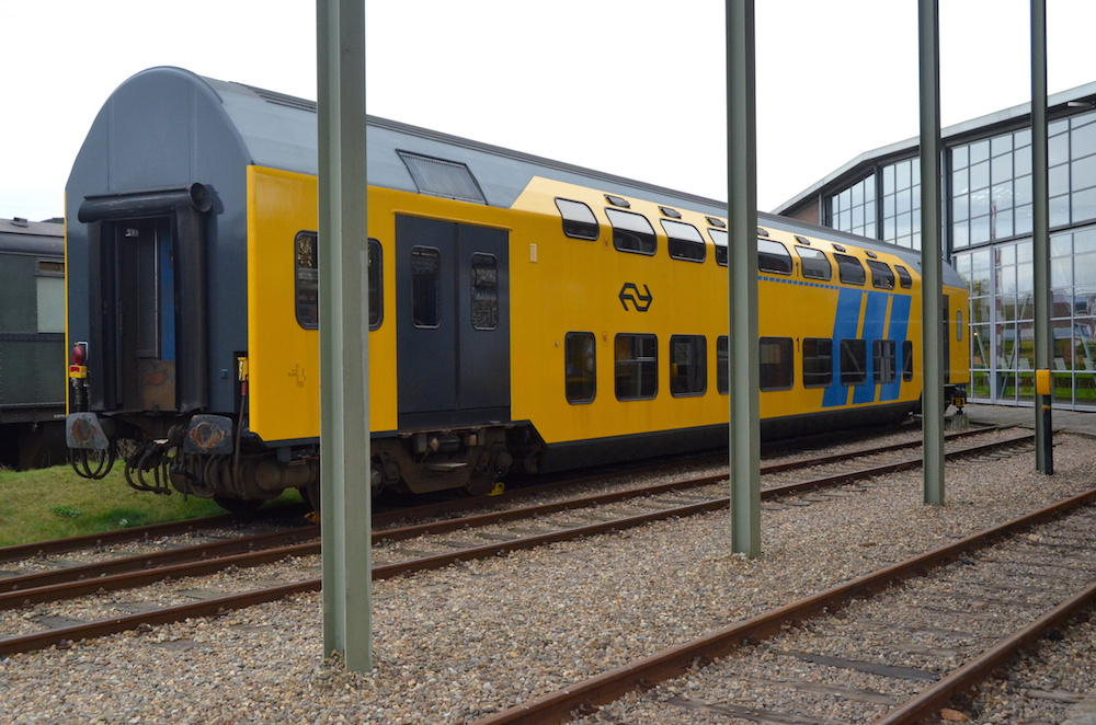 Nederlands Spoorwegmuseum rijtuig NS ABv 6618. Foto: Erik Swierstra.